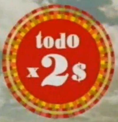 Logo de la segunda temporada de "Todo por dos pesos", emitida en ATC (Canal 7) de Buenos Aires.